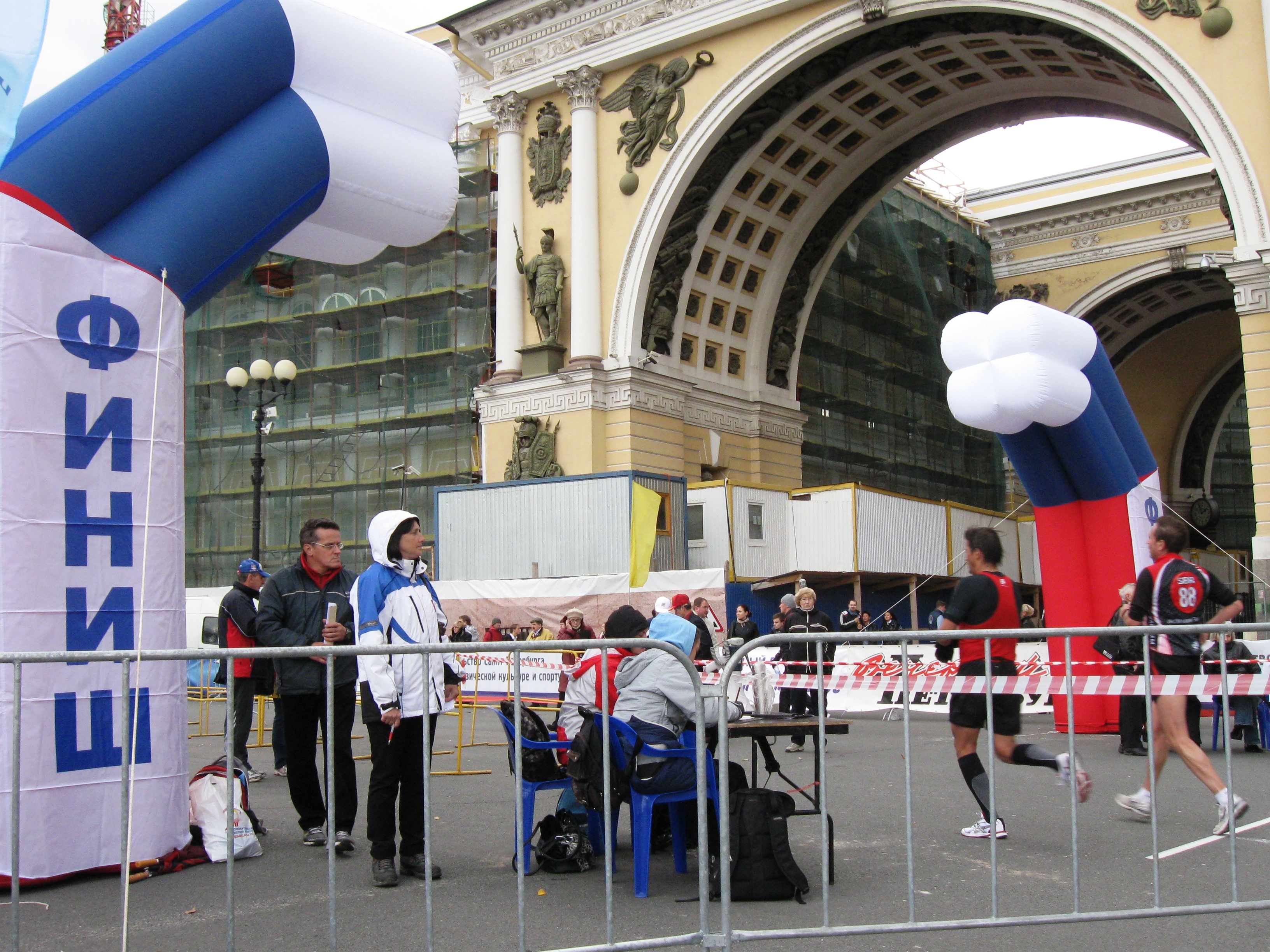 85-й международный легкоатлетический пробег Пушкин - Санкт-Петербург на призы газеты «Вечерний Петербург», посвящённый памяти В.И. Семёнова. Финишный створ на Дворцовой площади